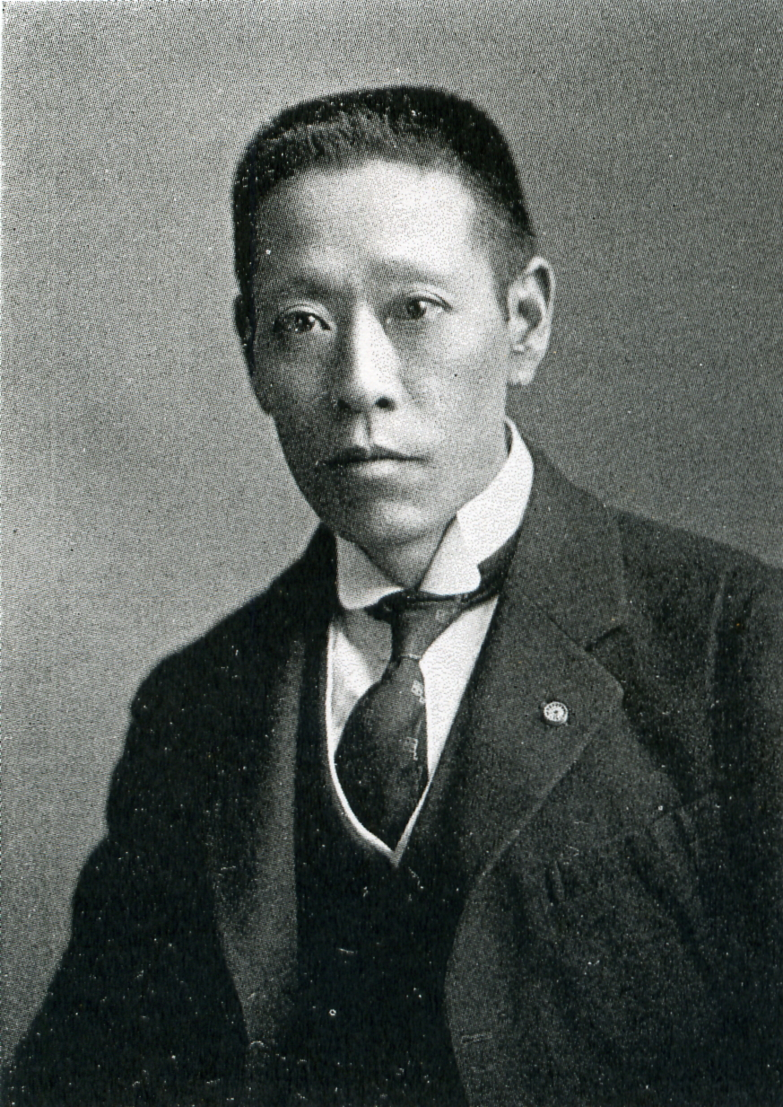 この写真は、若宮貞夫（1875-1946）の写真です。